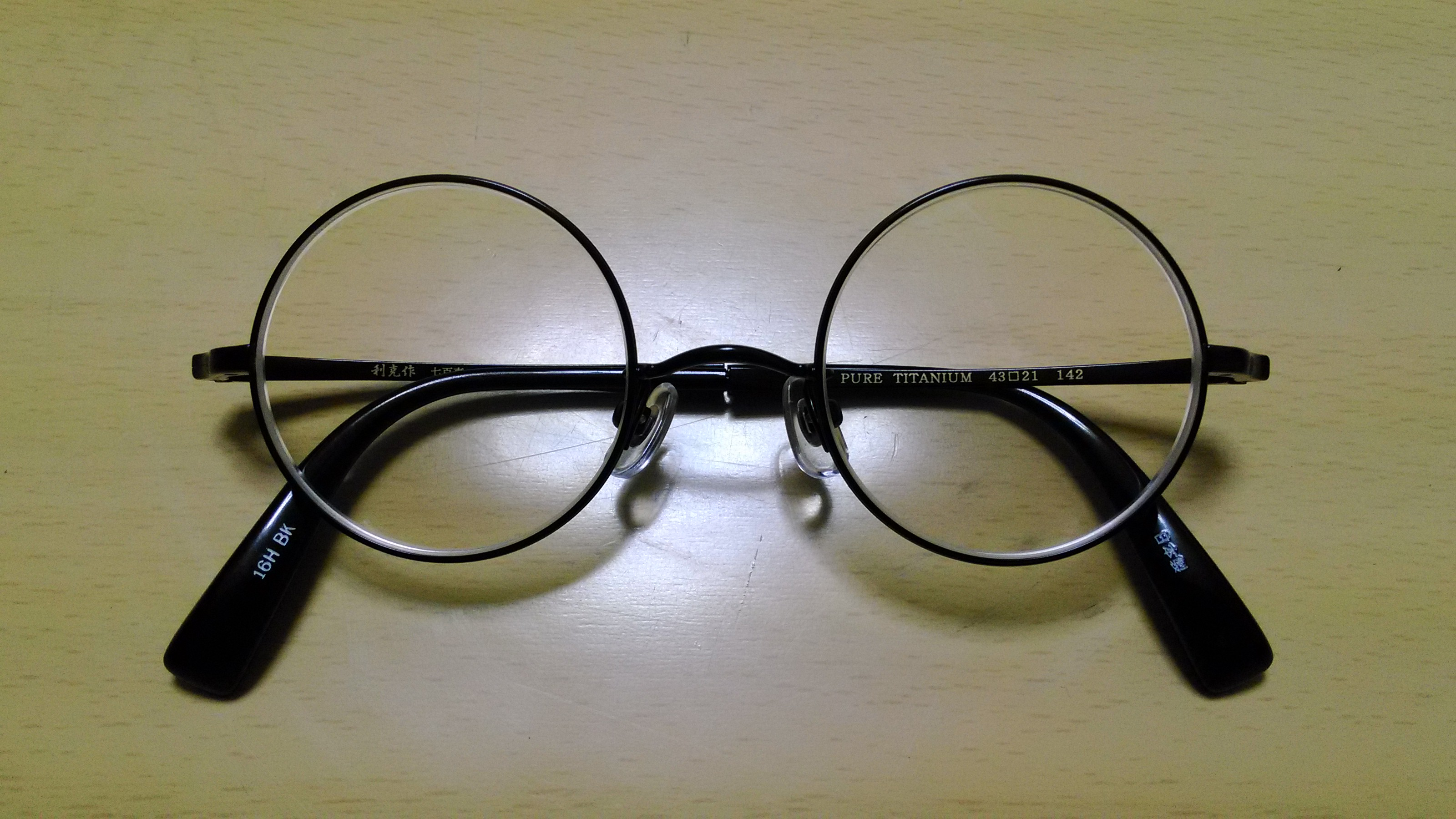 一般的なロイド眼鏡の例。眼鏡市場「利克作 七百壱」日本製